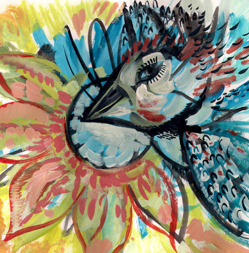 Фрагмент графической работы Александра Вепрёва «Птица-солнце», опубликованной в книге «Soarele cartofilor» Aleksandr Veprev. — Iaşi: Timpul, 2013год.